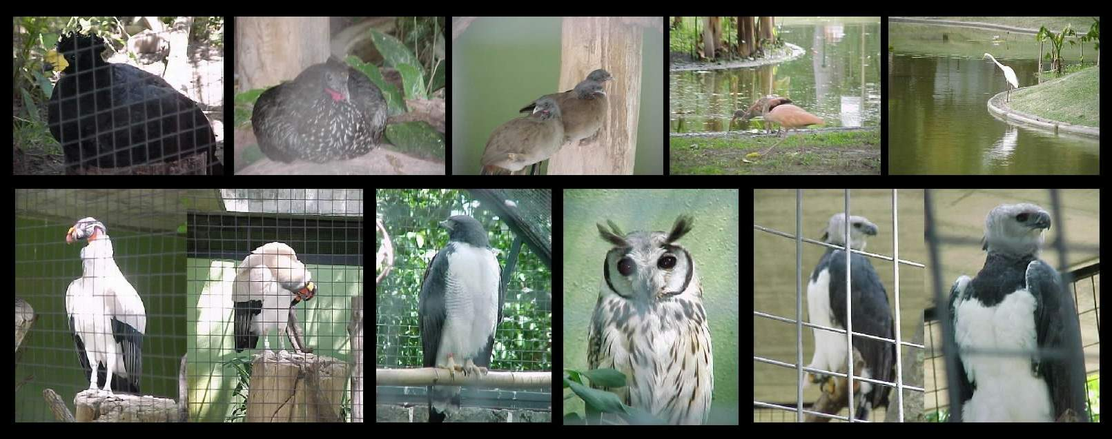 Aves del Parque Generalisimo Francisco de Miranda Caracas - Venezuela